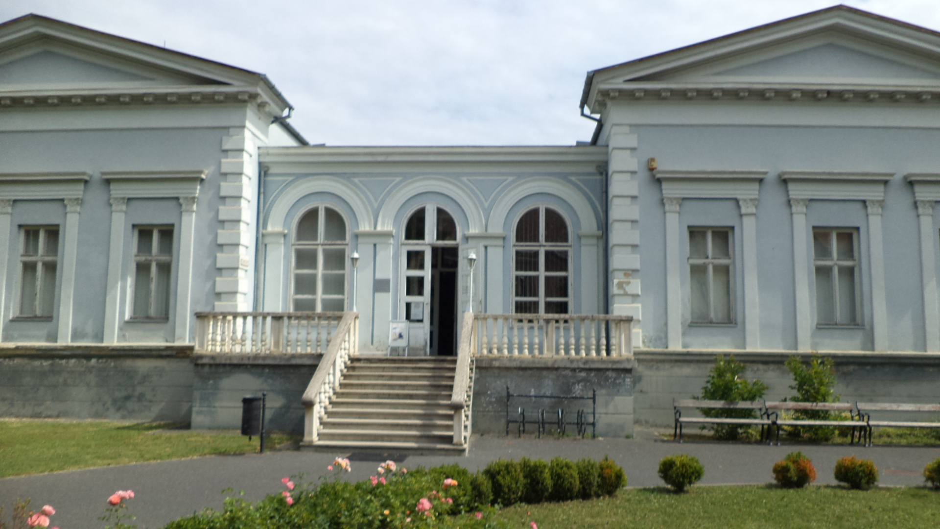 Képzőművészetek Háza, Nagykanizsa (Kiskastély)